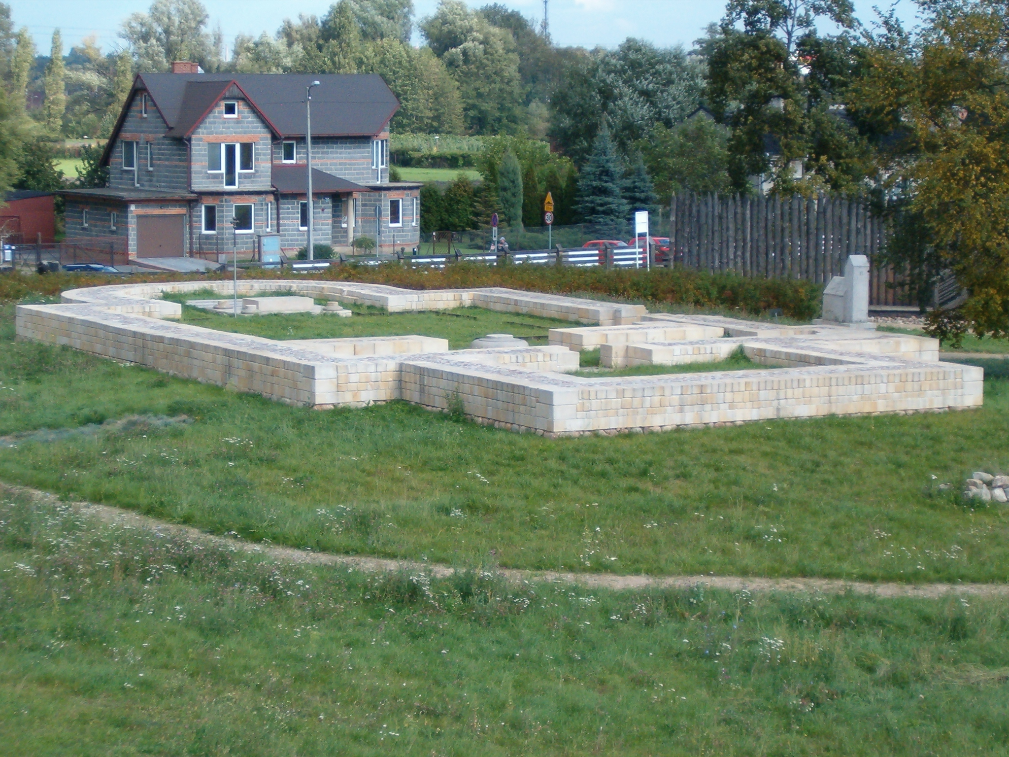 Fundamenty kolegiaty św. Pawła Apostoła w Kaliszu